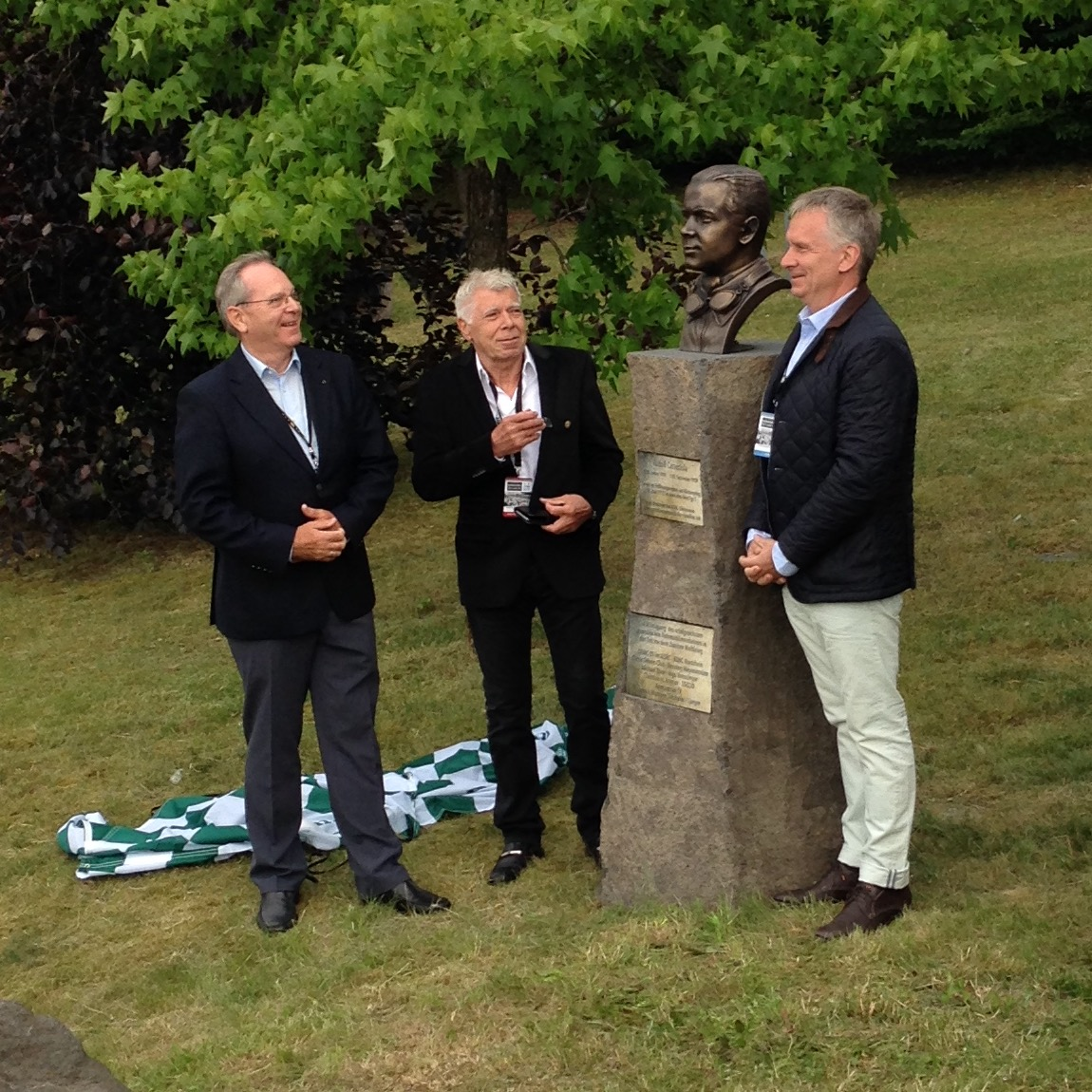 Nürburgring Classic, 16.06.2017: Zu Ehren des Siegers des Eröffungsrennens 1927, Rudolf Caracciola, wurde unweit der Muntorf-Tankstelle an der Auffahrt aus dem historischen Fahrerlager eine Stele mit Büste eingeweiht. DAMC 05-Ehrenvorsitzender Dr. Rainer Temme enthüllte zusammen mit ADAC Nordrhein Vorsitzenden Peter Meyer und Thomas Caracciola, dem Großneffen Rudolf Caracciolas, die Gedenksäule.